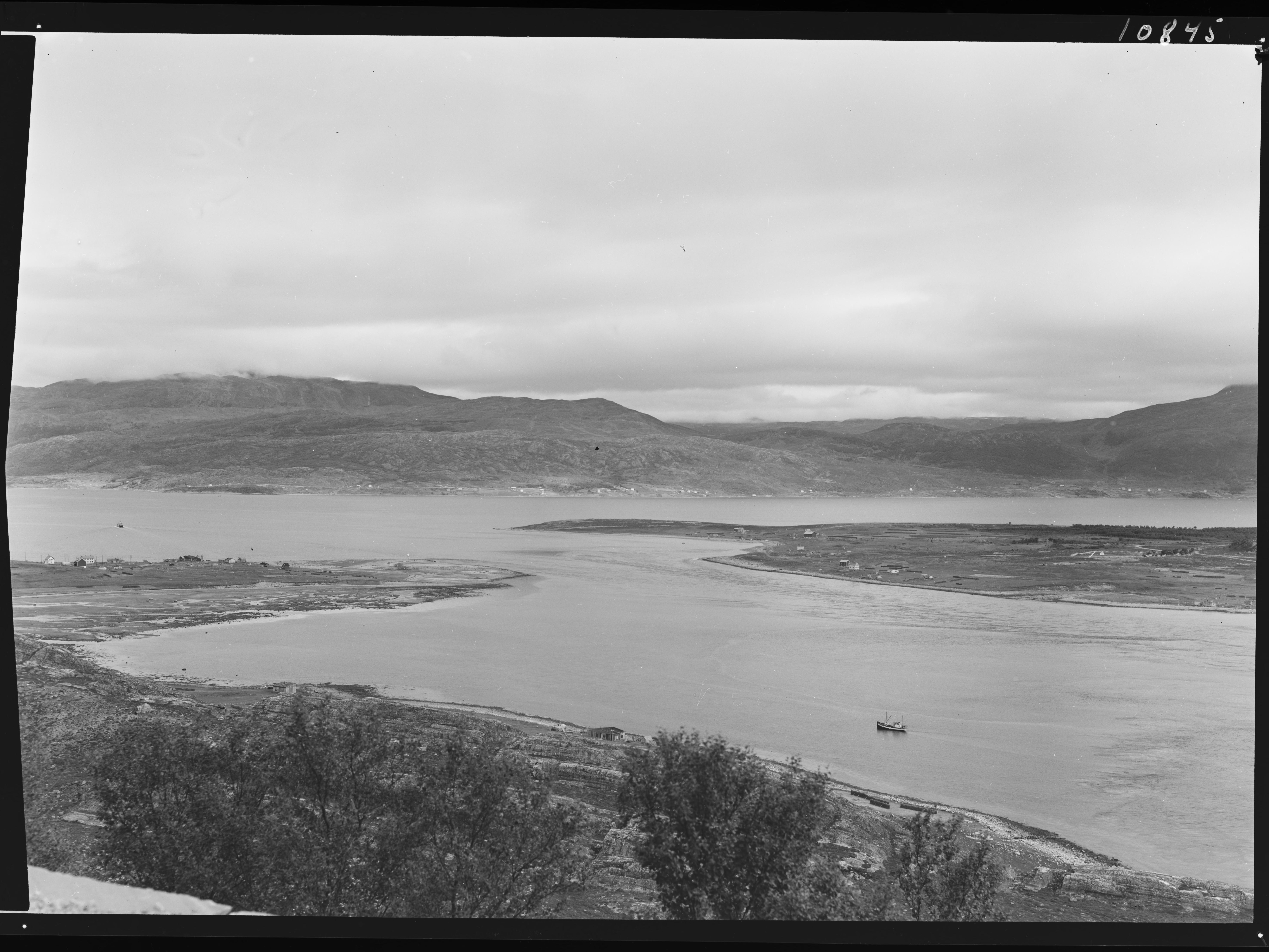 Bildet er hentet fra Nasjonalbibliotekets bildesamling. Anmerkninger til bildet var: fotograf ukjent. Kvænangen,Nordstraumen,Sørstraumen, Kvænangen, Troms